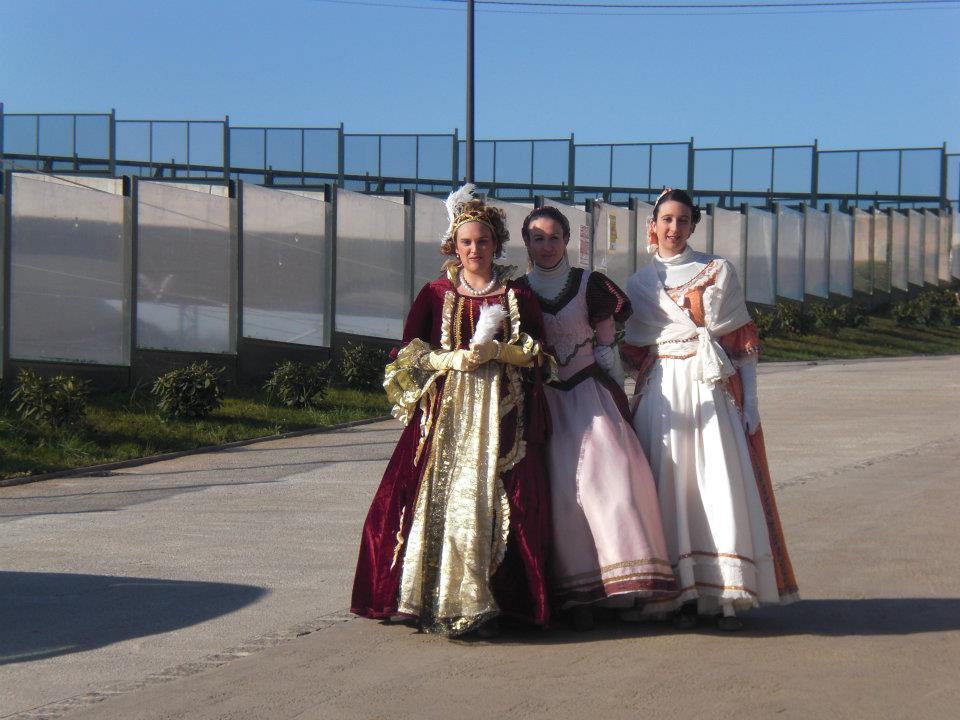 Fiestas